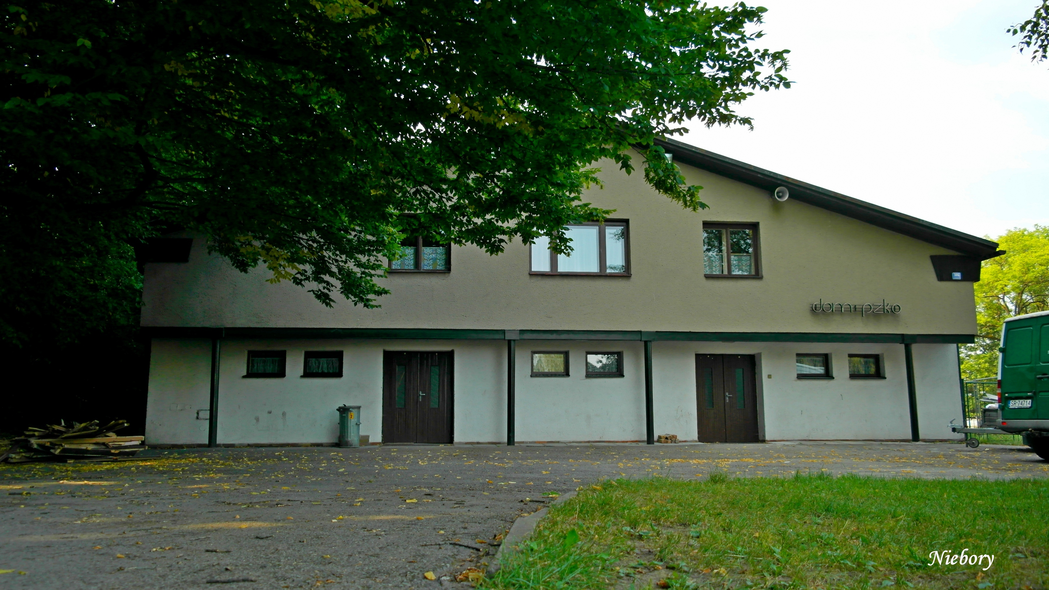 PZKO Nebory